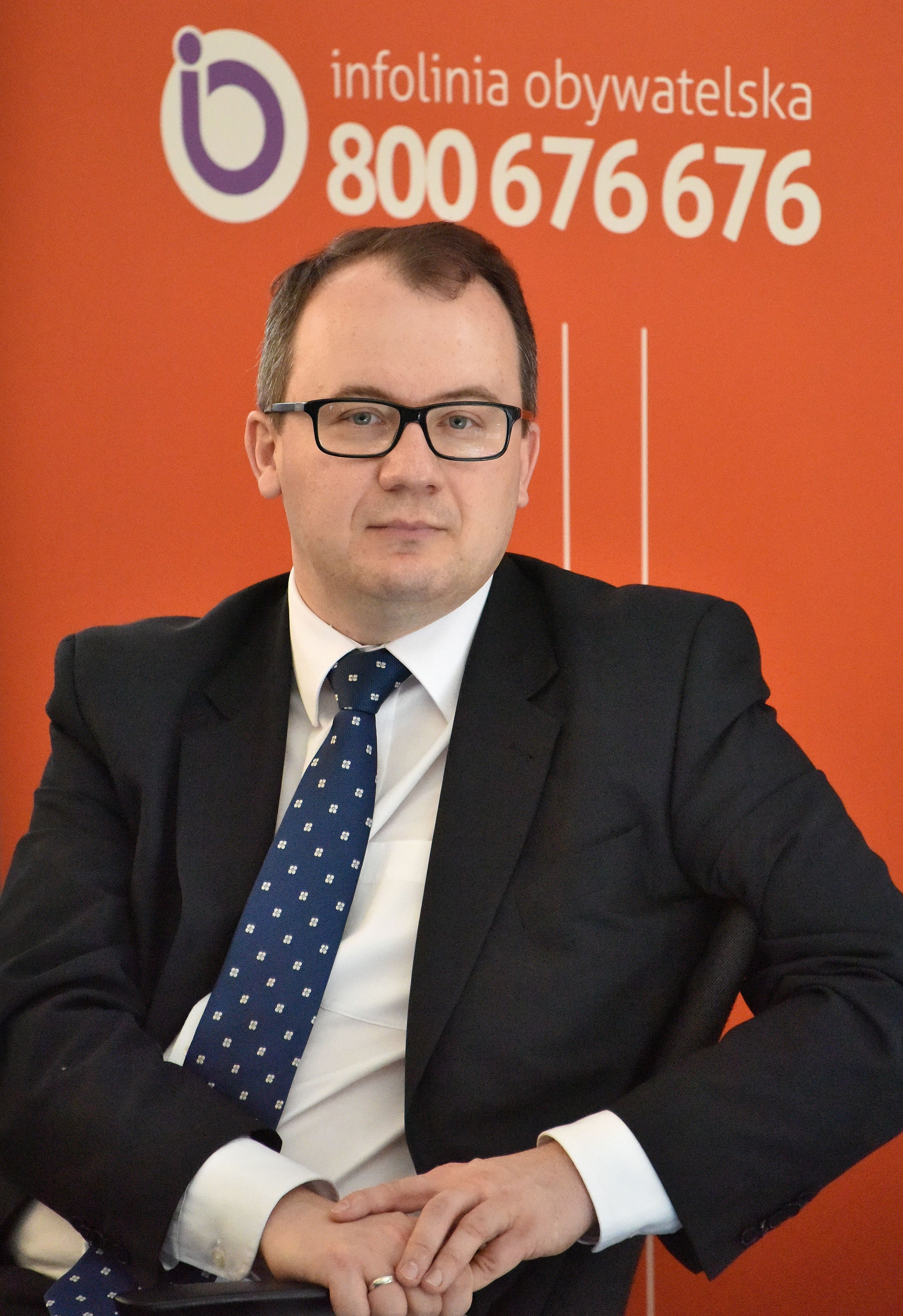 Rzecznik Praw Obywatelskich Adam Bodnar podczas dnia otwartego z RPO "Otwarci na Konstytucję" w siedzibie Biura RPO przy ul. Długiej 23/25 w Warszawie